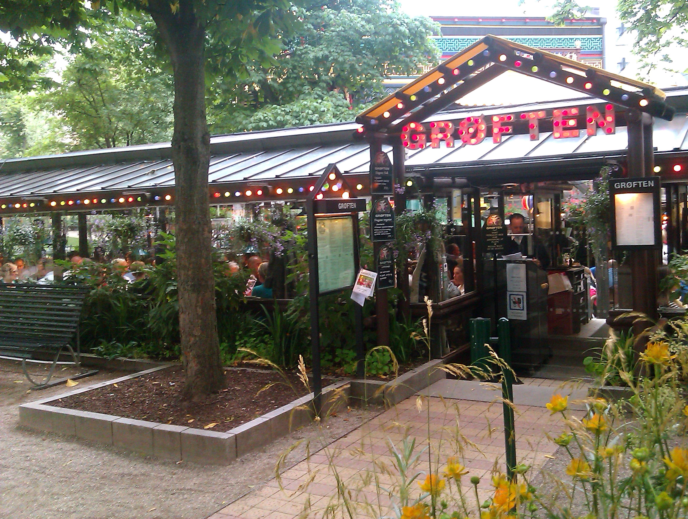 Restaurant Grøften i Tivoli, København